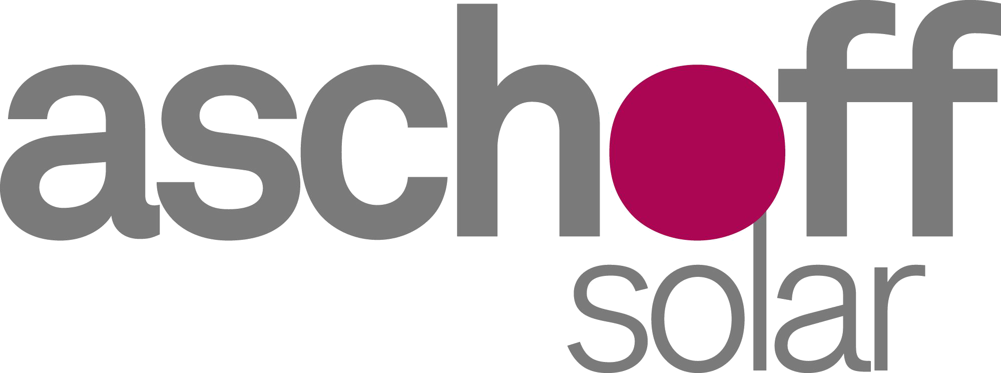 Aschoff Solar